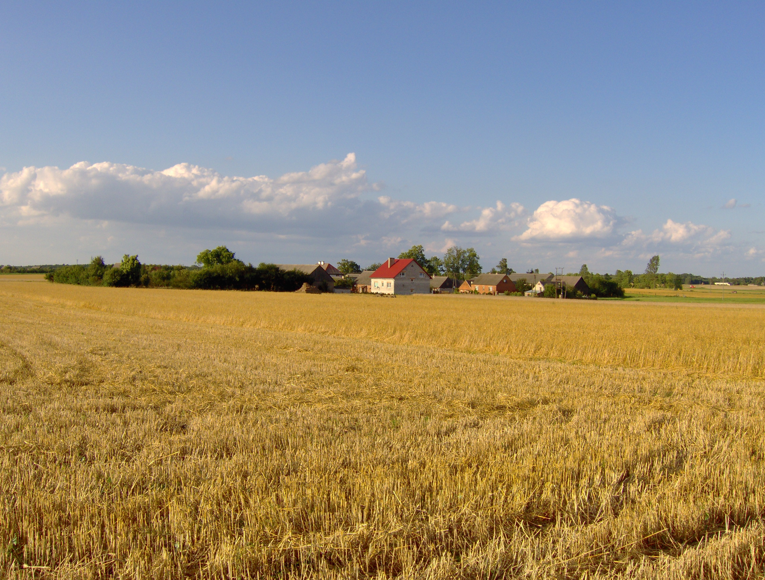 Nowa Wieś (powiat sępoleński) - widok od strony południowej.